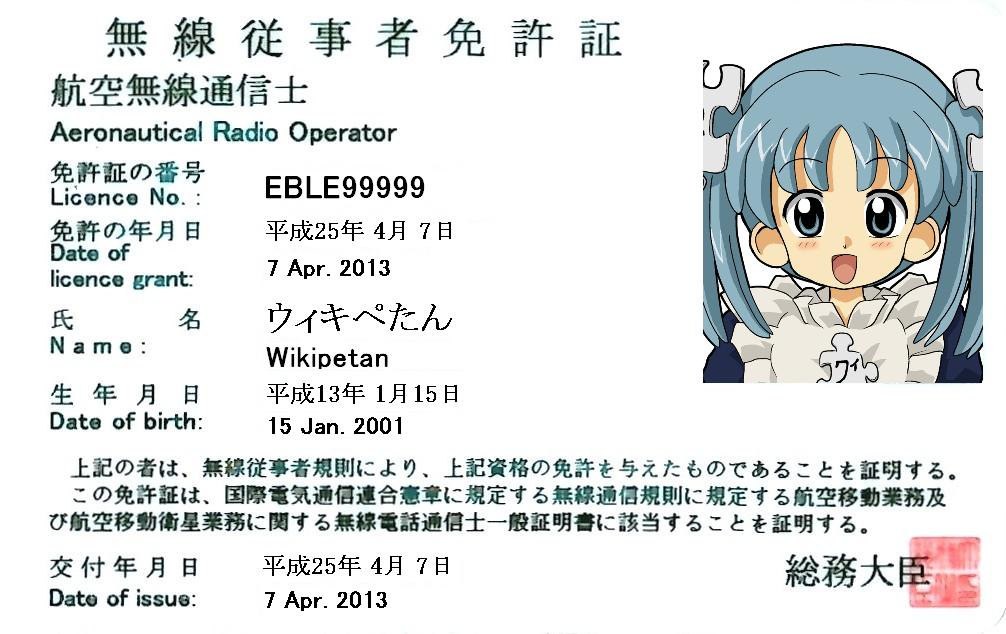 平成22年4月以降発給されている無線従事者免許証（航空無線通信士）